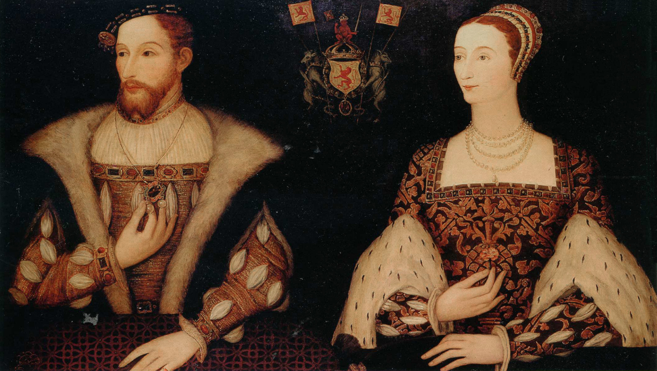 Doppelporträt James V. und seiner zweiten Frau Marie de Guise im Falkland Palace